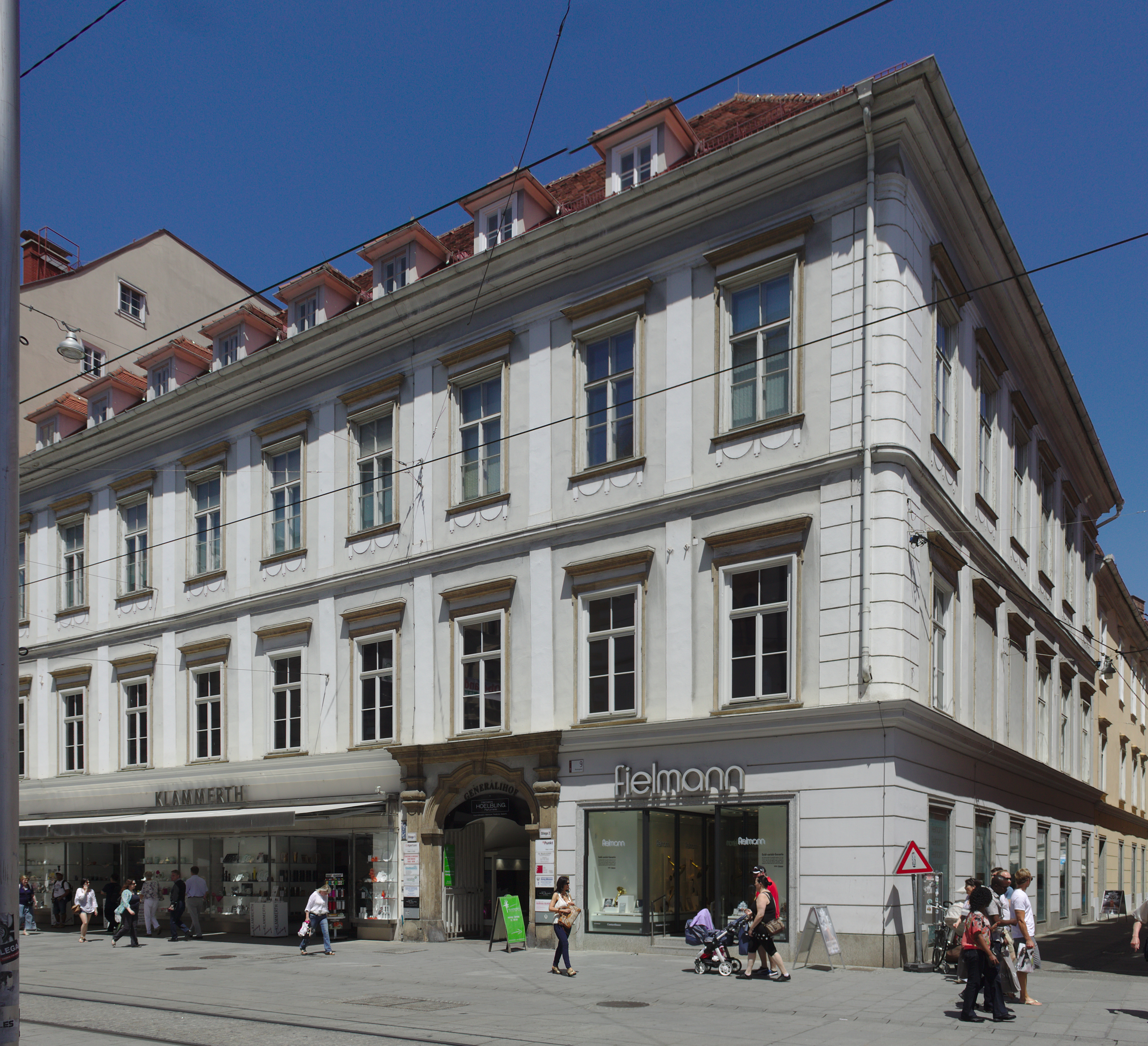 Generalihof, ehem. Palais Breuner